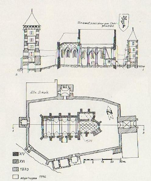 Planul fortificatiei din Valchid.